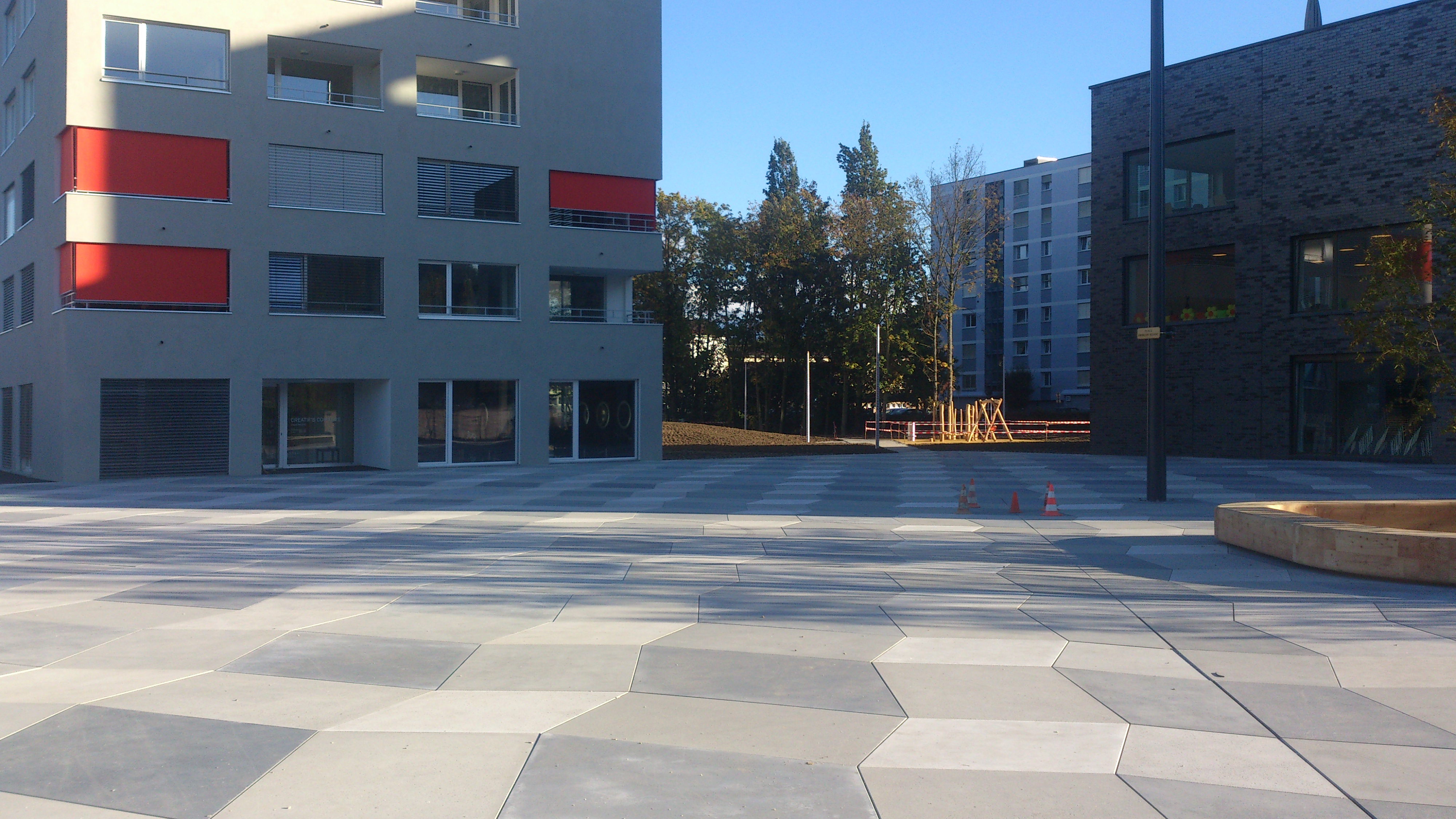 Ecublens